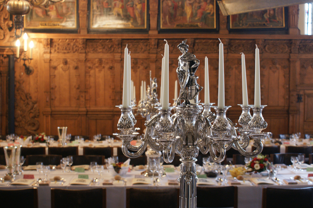 „Stimmungsbild“ von der 465. Schaffermahlzeit 2009 von Haus Seefahrt in der Oberen Rathaushalle des historischen Rathauses in Bremen, Deutschland: Die eingedeckte Festtafel vor Beginn des Festessens mit einem der großen silbernen Kerzenleuchter.